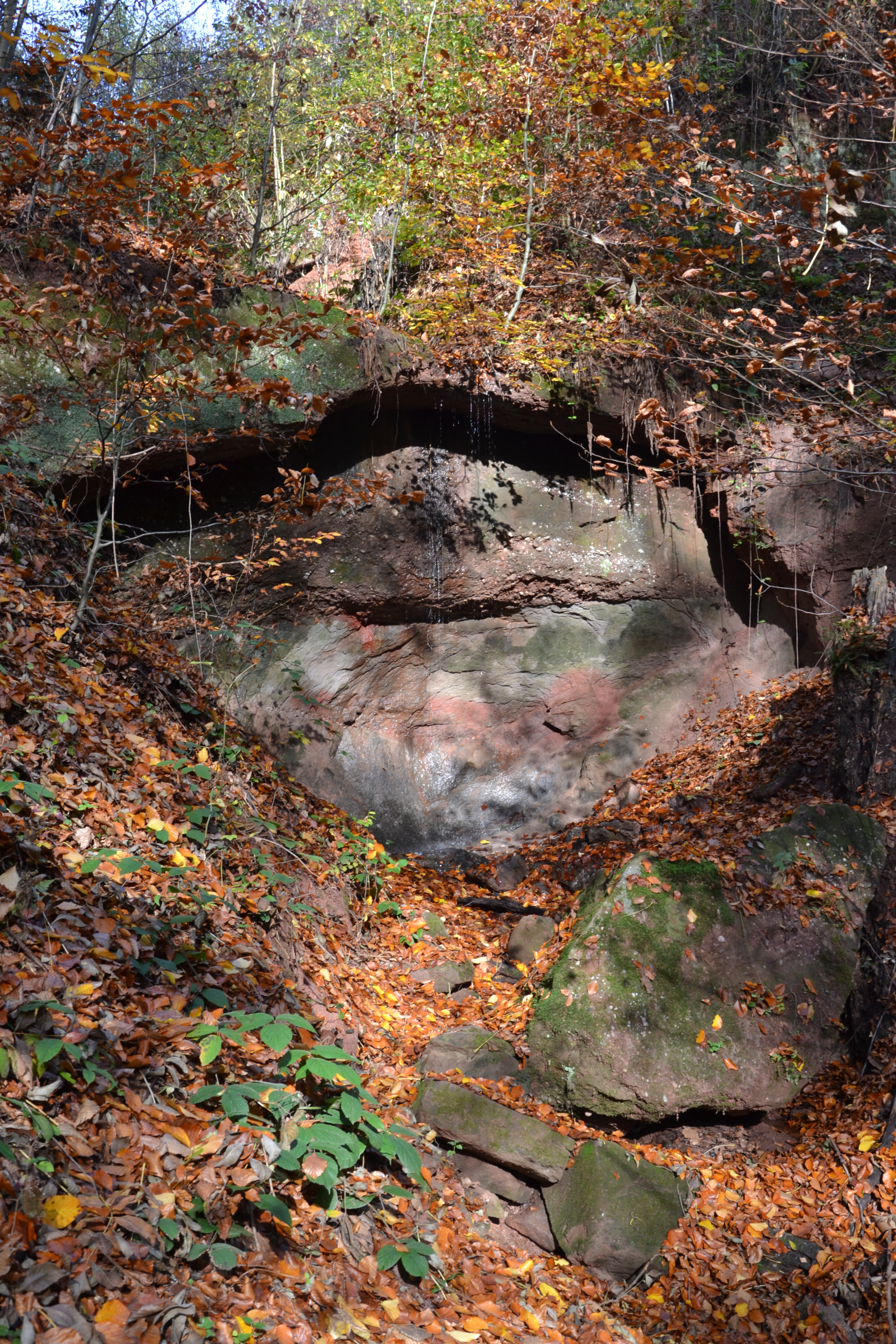 Horní, menší vodopád s výškou 4 m